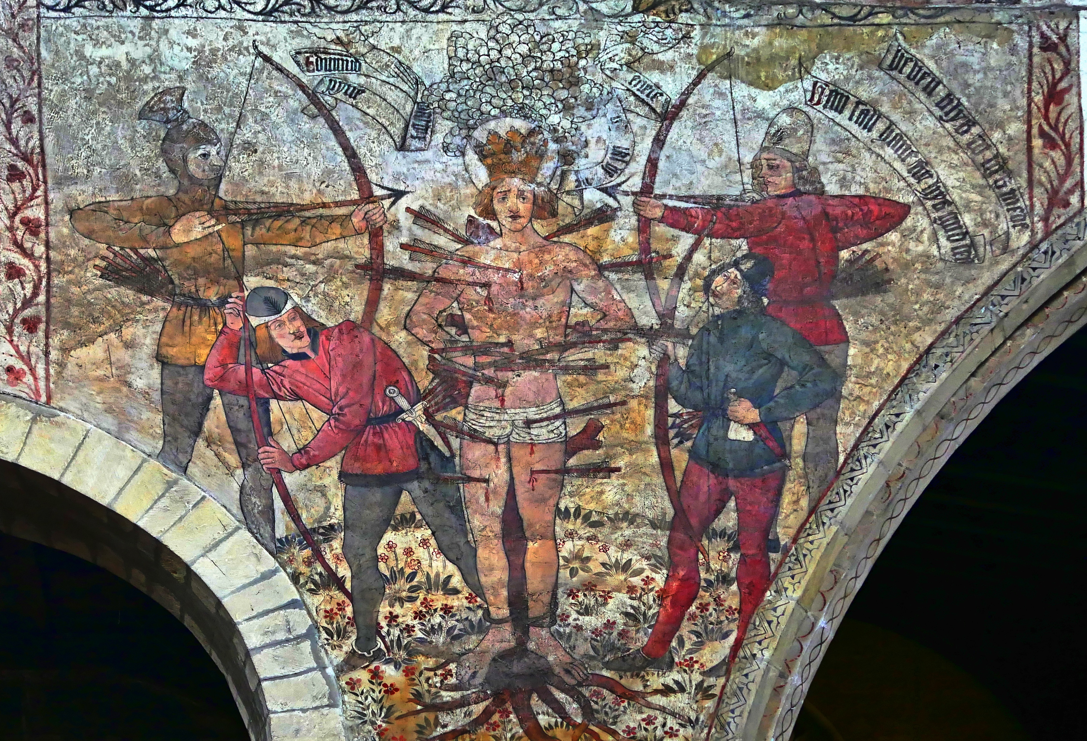 The Martyrdom of St. Edmund, Medieval fresco in the saints peter and paul church in Pickering (North Yorkshire)